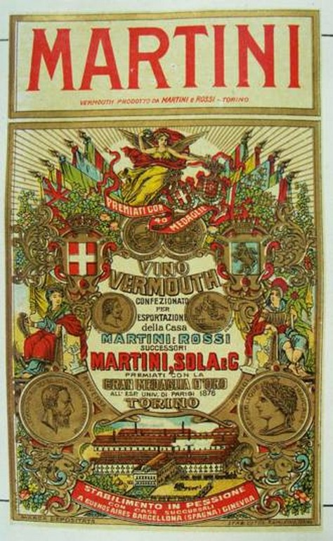 Etichetta vino e vermouth della Martini, Sola e C. oggi Martini & Rossi, 6 maggio 1920 (ACS, Ministero dell'Industria Commercio e Artigianato, Fondo Ufficio Italiano Brevetti e Marchi, Serie Marchi, fasc. 19658, 1920)